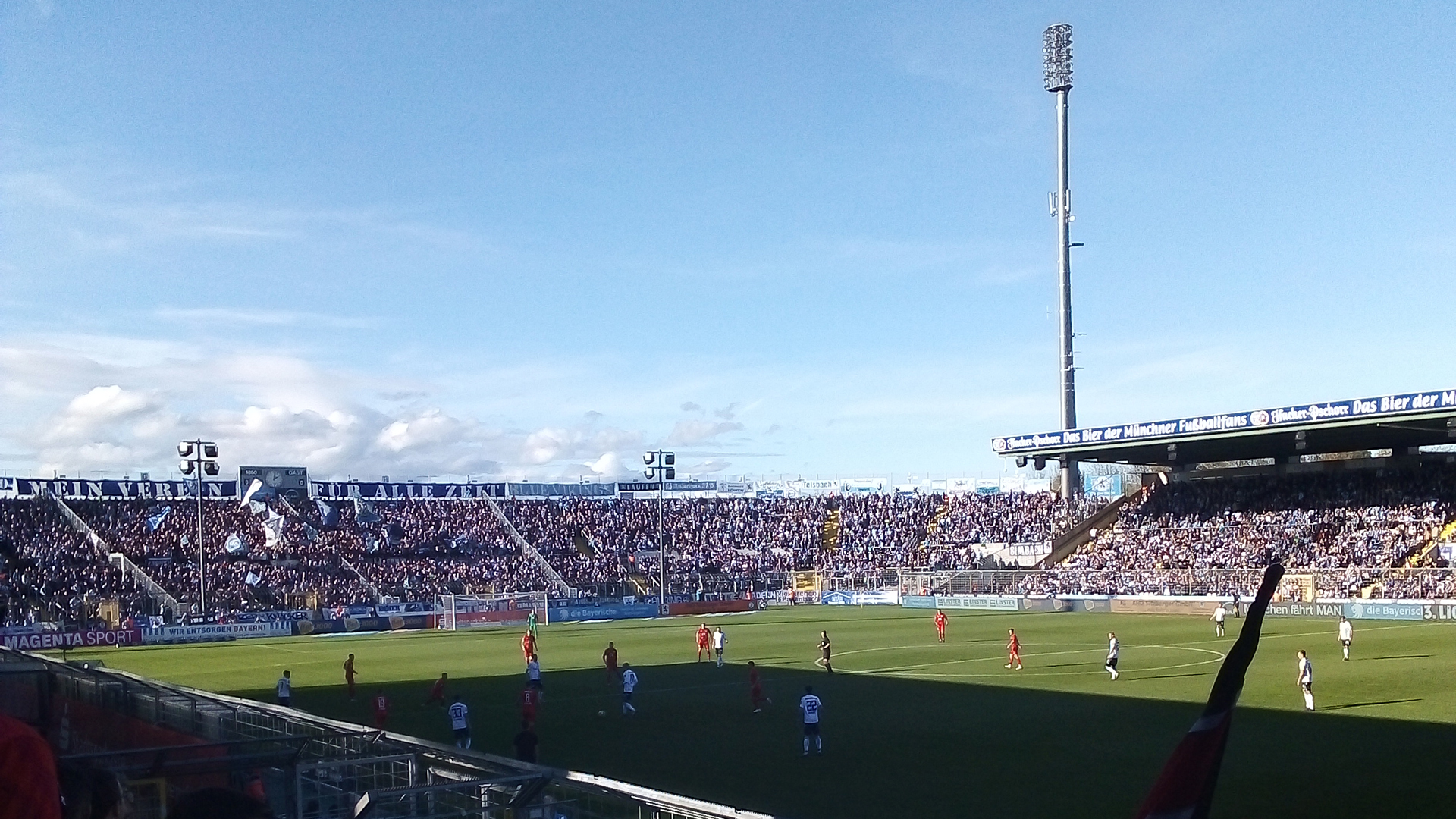 Spielszene der 3.Liga 19/20 am 14. Spieltag. 1860 München gegen Viktoria Köln.